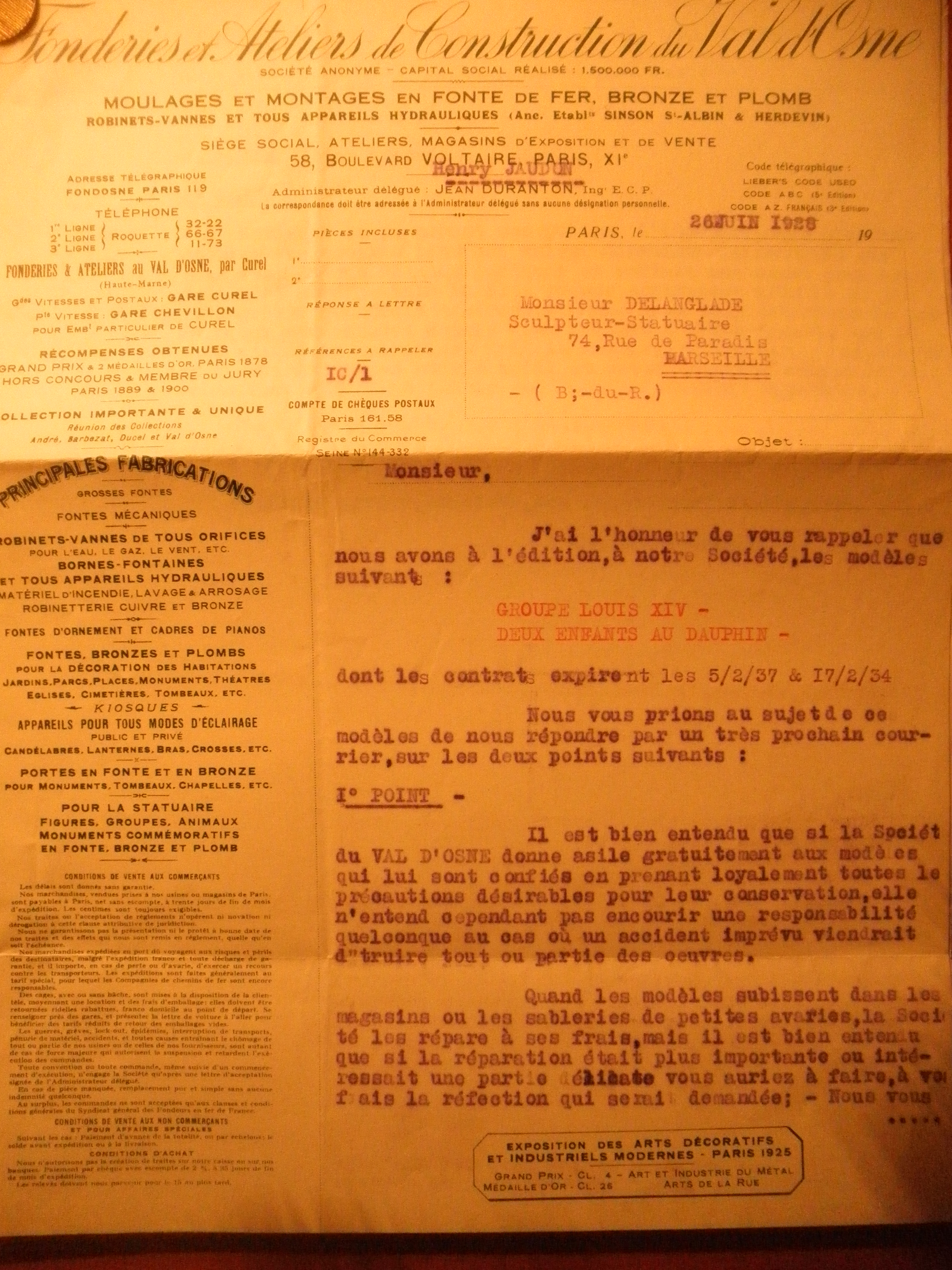 1910 contrat Bonnasse Val d'Osne